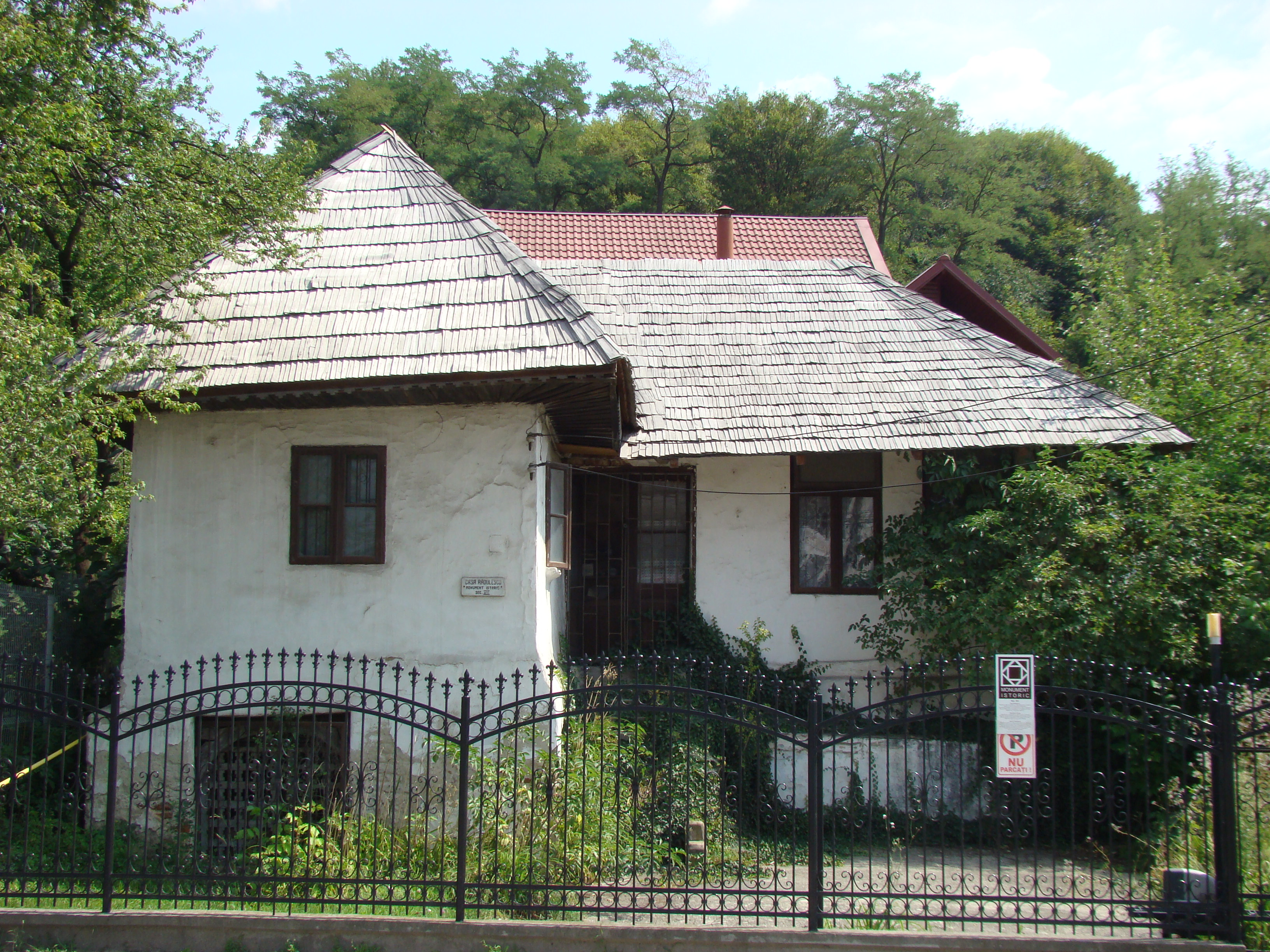 Casa Rădulescu din Curtea de Argeș (sec. XIX)